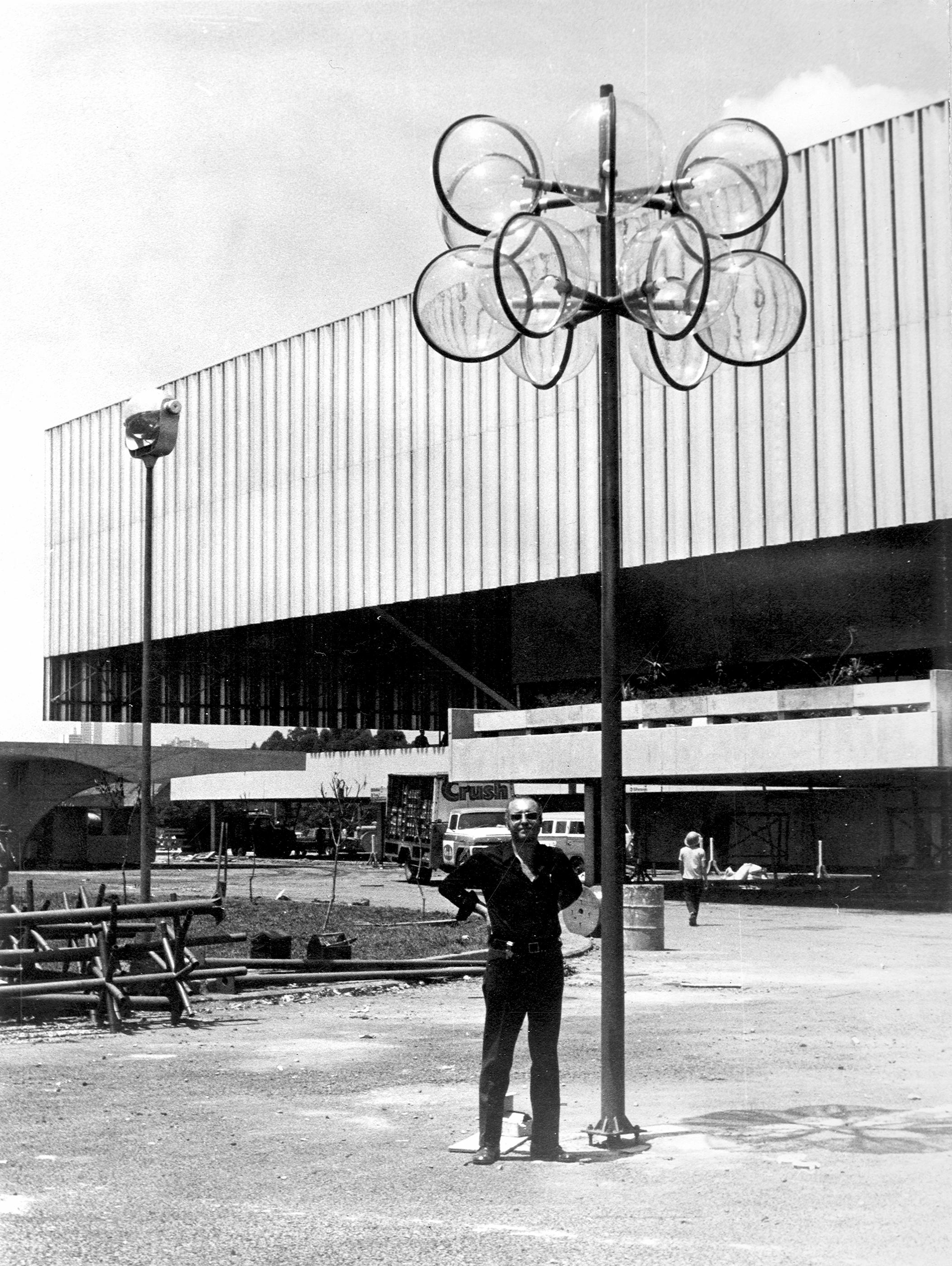 Livio Levi, designer da iluminaçao do Parque Anhembi